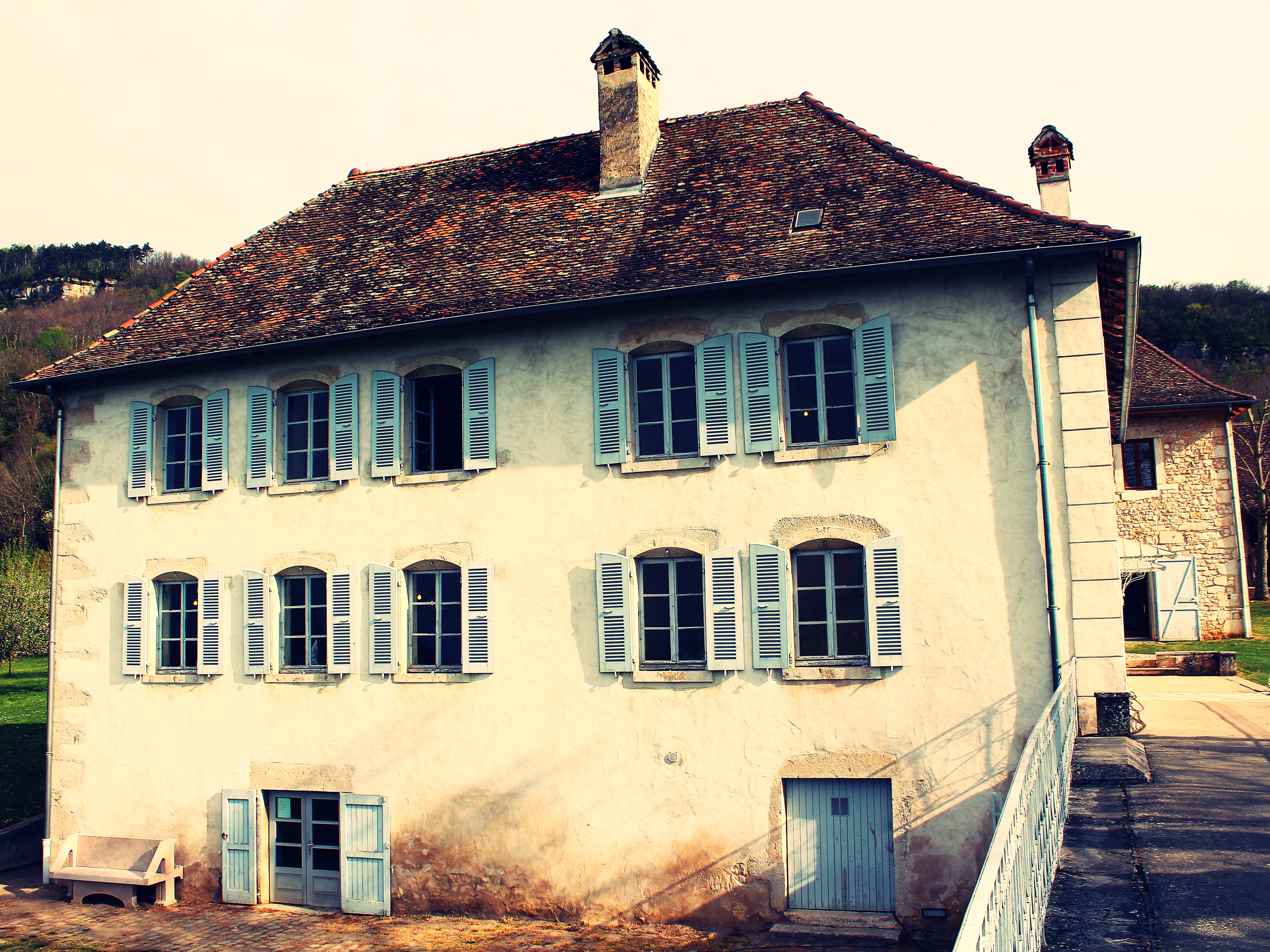 Das Haus (Maison d'Izieu) in welchem die 44 Kinder von Izieu bis April 1944 versteckt worden waren.